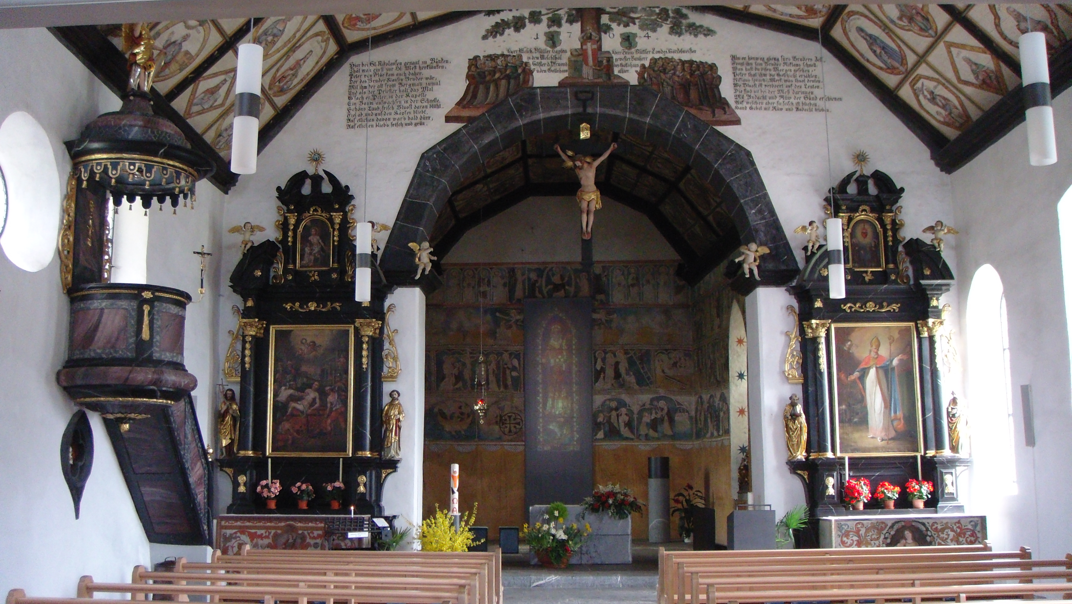 Kapelle St. Nikolaus bei St. Niklausen OW